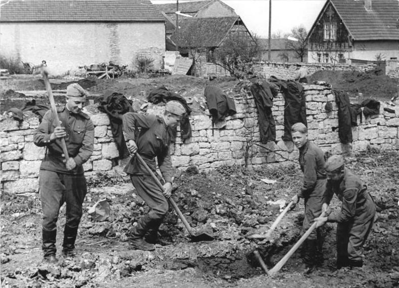 Nettelstedt, Sowjetsoldaten, Wiederaufbau einer LPG Zentralbild Brix-Frö-Jos-13.5.1958 Sowjetsoldaten helfen beim Wiederaufbau einer LPG-Sowjetische Soldaten und Offiziere kamen am 10.9.1958 in die Gemeinde Nettelstedt, Landkreis Weimar, um den Genossenschaftsbauern der LPG "Freie Scholle" beim Wiederaufbau ihrer vor einigen Monaten in Brand geratenen Genossenschaft zu helfen. (Weiteres siehe ADN-Meldung v. 10.5.1958) UBz: Die sowjetischen Soldaten bei Planierungsarbeiten